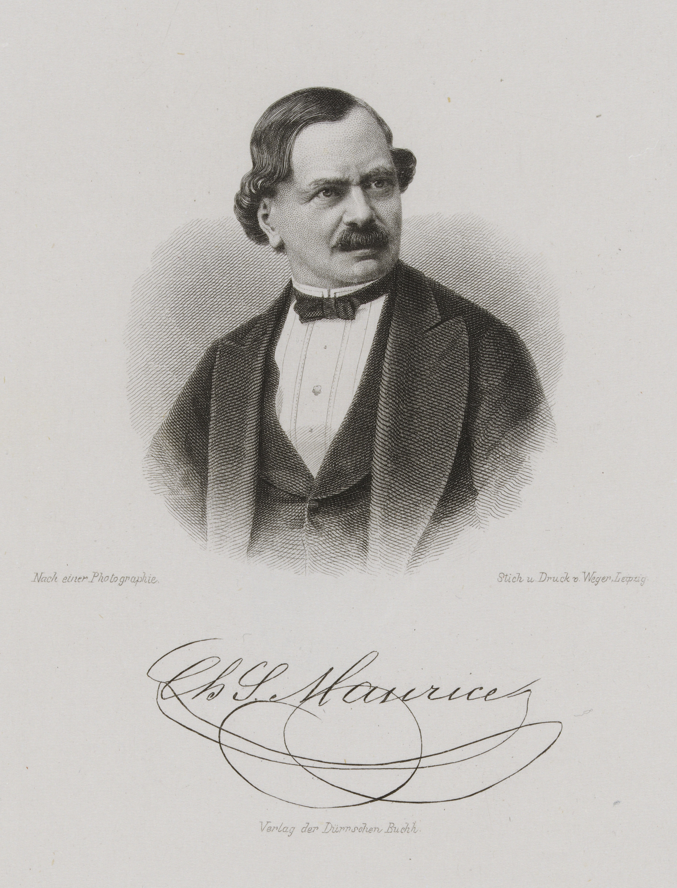 Bildnis von Charles Maurice-Schwartzenberger